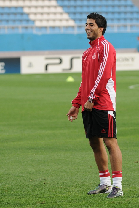 Luis Suárez